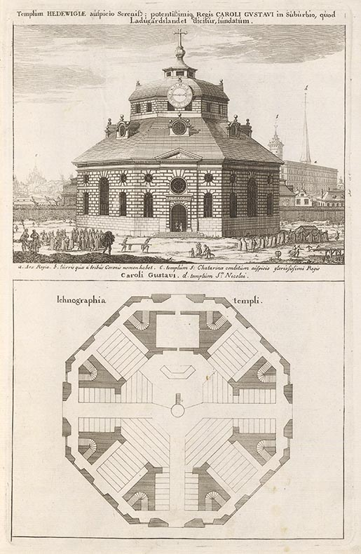 Hedvig Eleonora kyrka, grundlagd på den höge och mäktige konung Karl Gustafs tillskyndan i den förstad, som nu kallas Ladugårdslandet. Plan av kyrkan.